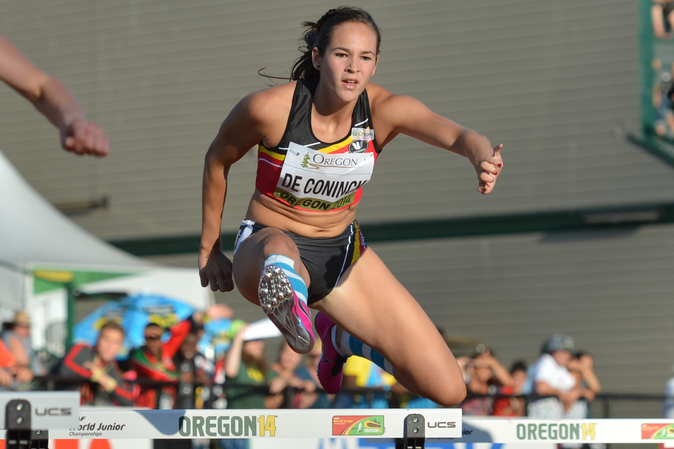 Nenah De Coninck in actie tijdens de WK voor junioren in 2014